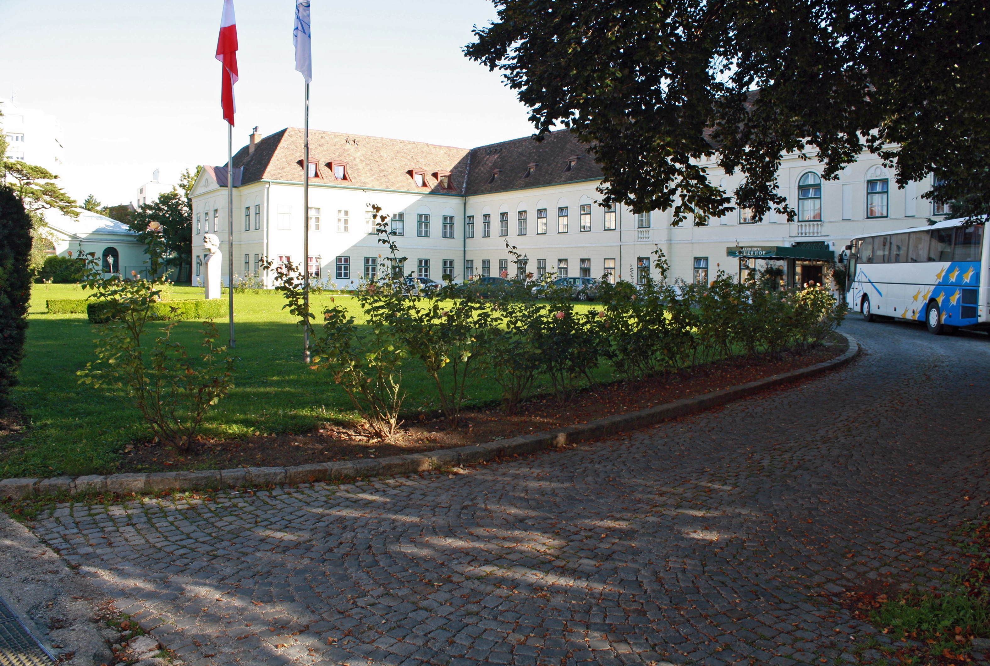 Sauerhof in Baden in Niederösterreich